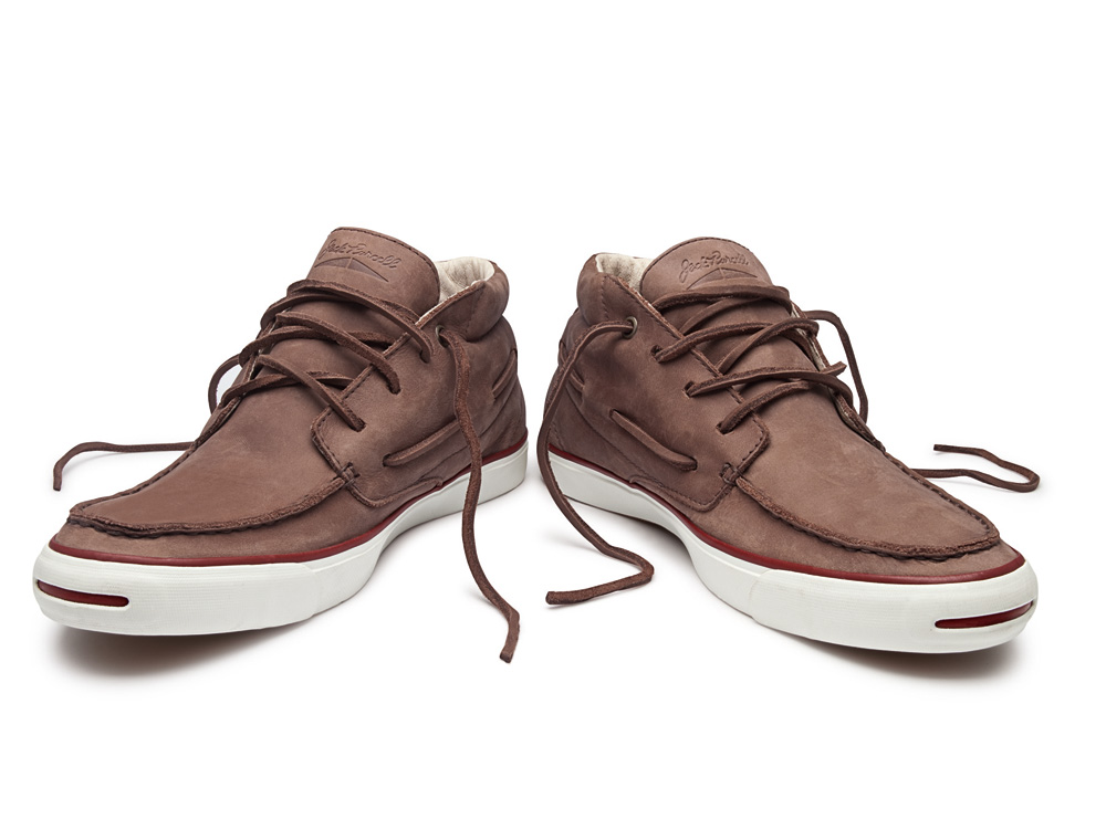 Jack Purcell Boat Shoes desenvolvido pela Converse para a coleção Outono/Inverno 2011